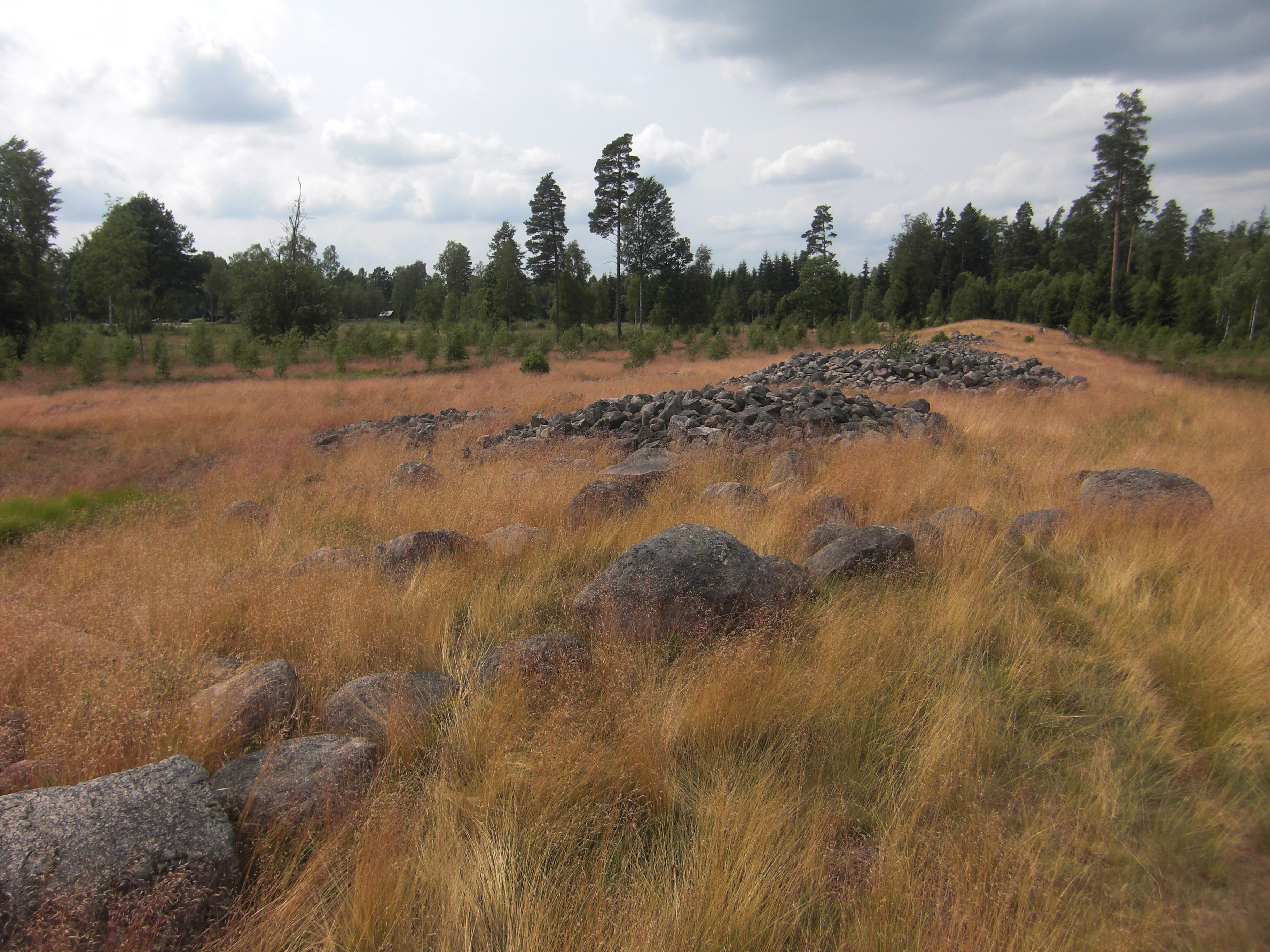 Orraryds gravfält (Raä-nr Nöbbele 3:1) i Nöbbele socken i Konga härad i Värend, Växjö kommun, Kronobergs län, Småland, Sverige.